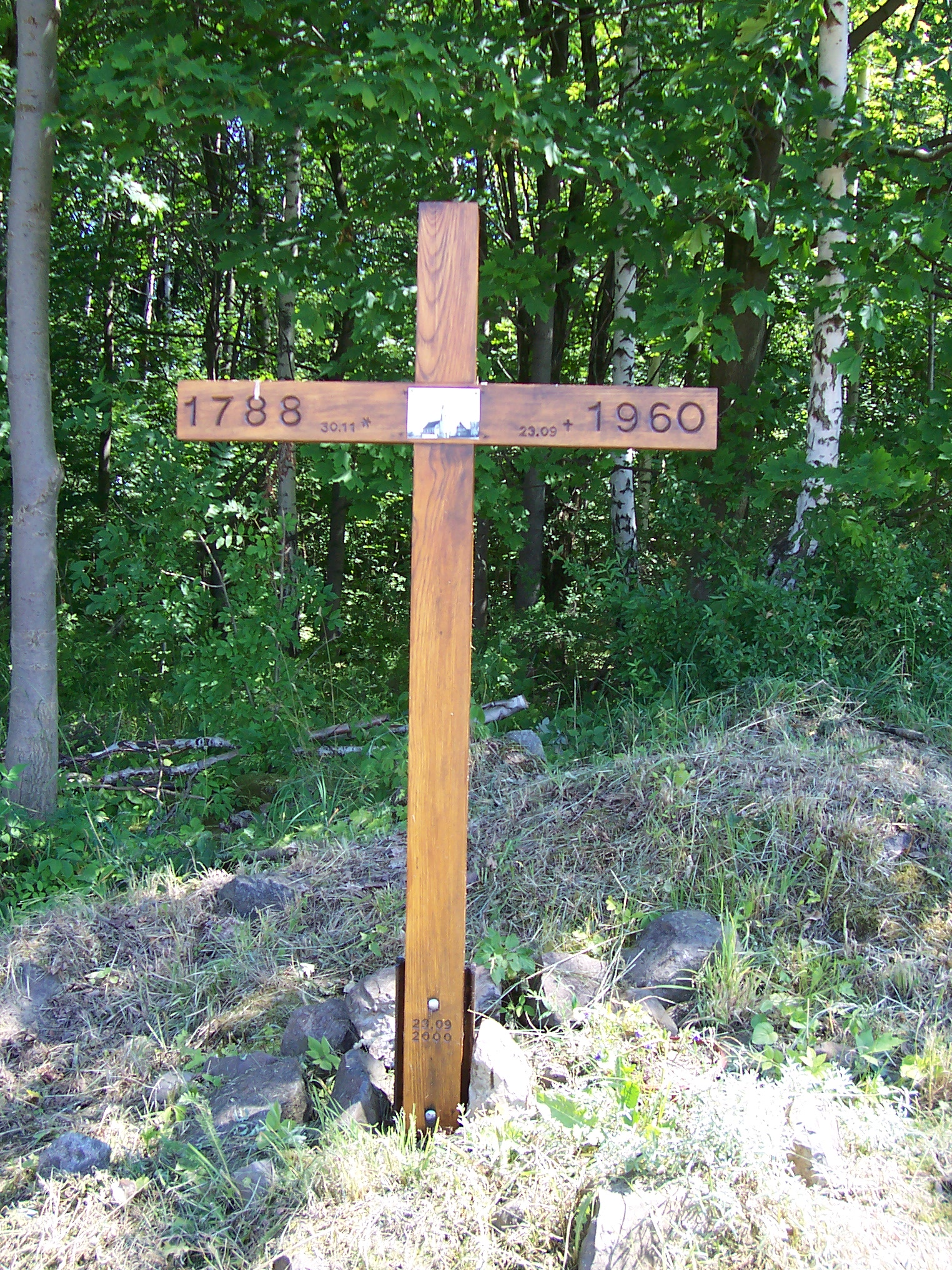 Dřevěný kříž připomíná bývalou obec Fukově